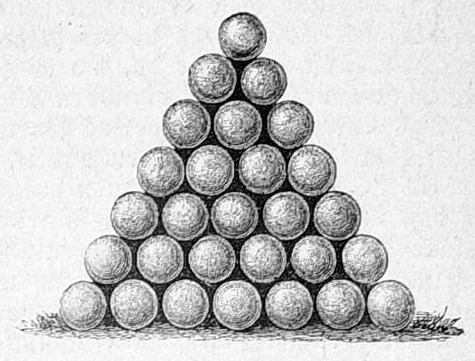 Bild aus Seite 320 in "Die Gartenlaube". Image from page 320 of journal Die Gartenlaube, 1887.